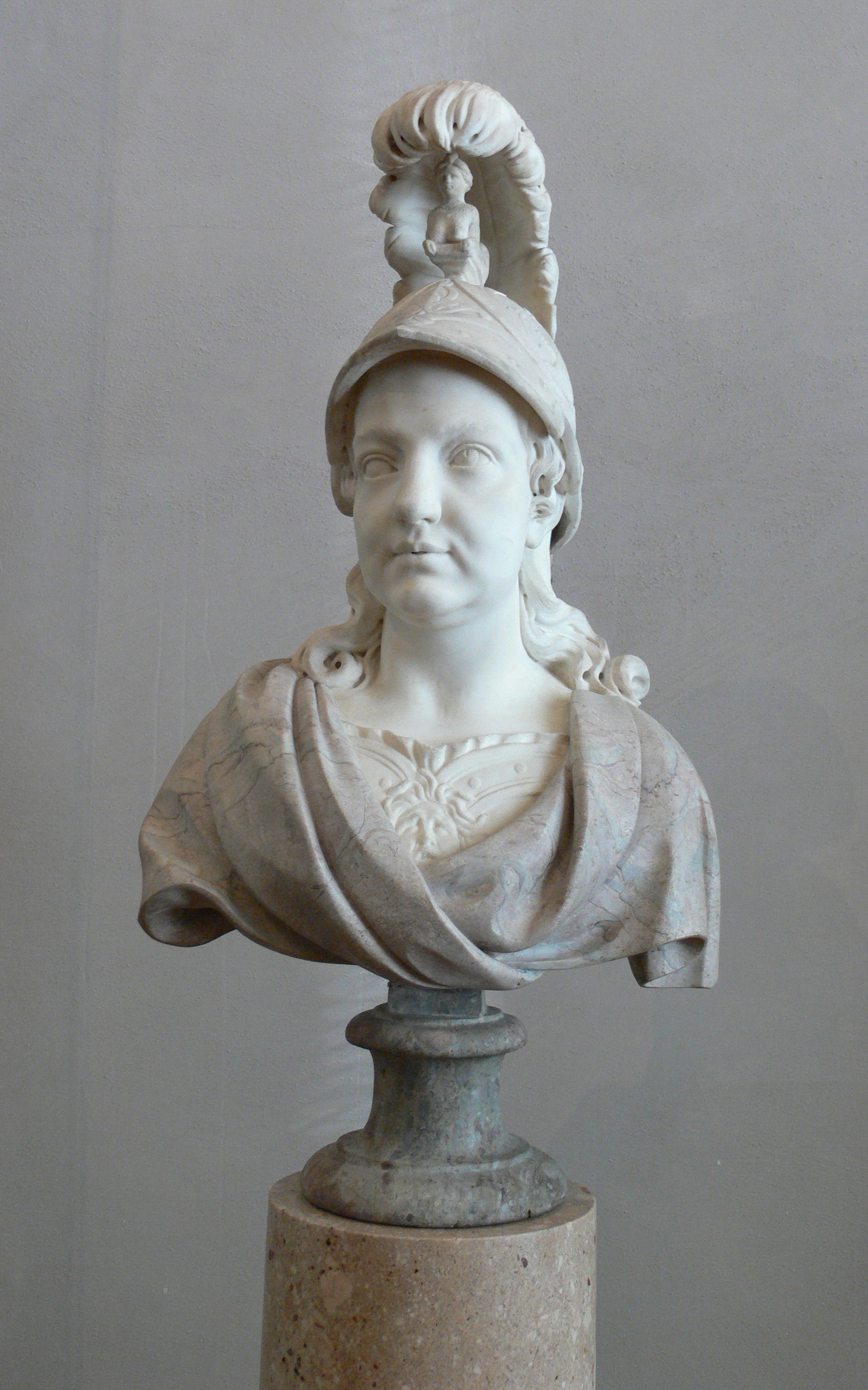 Büste der Kurfürstin Elisabeth Auguste von der Pfalz als Minerva; Mannheim, um 1760–1765 Marmor Bayerisches Nationalmuseum München; Geschenk des Freundeskreises des BNM, Inv. Nr. R3223